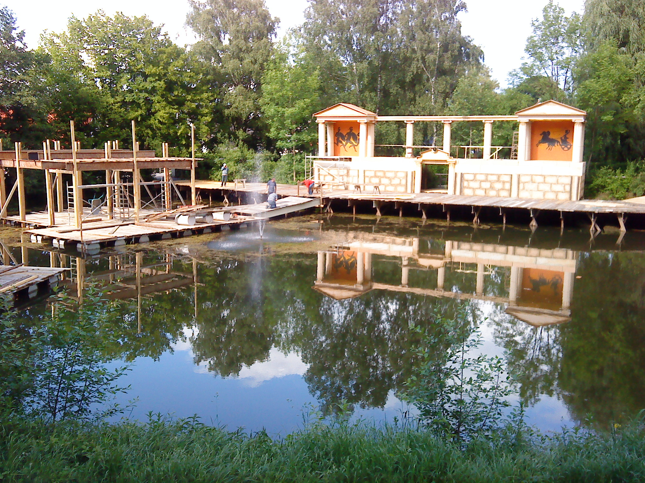 Aufbau der Dekoration für die Weiherspiele 2009 in Markt Schwaben